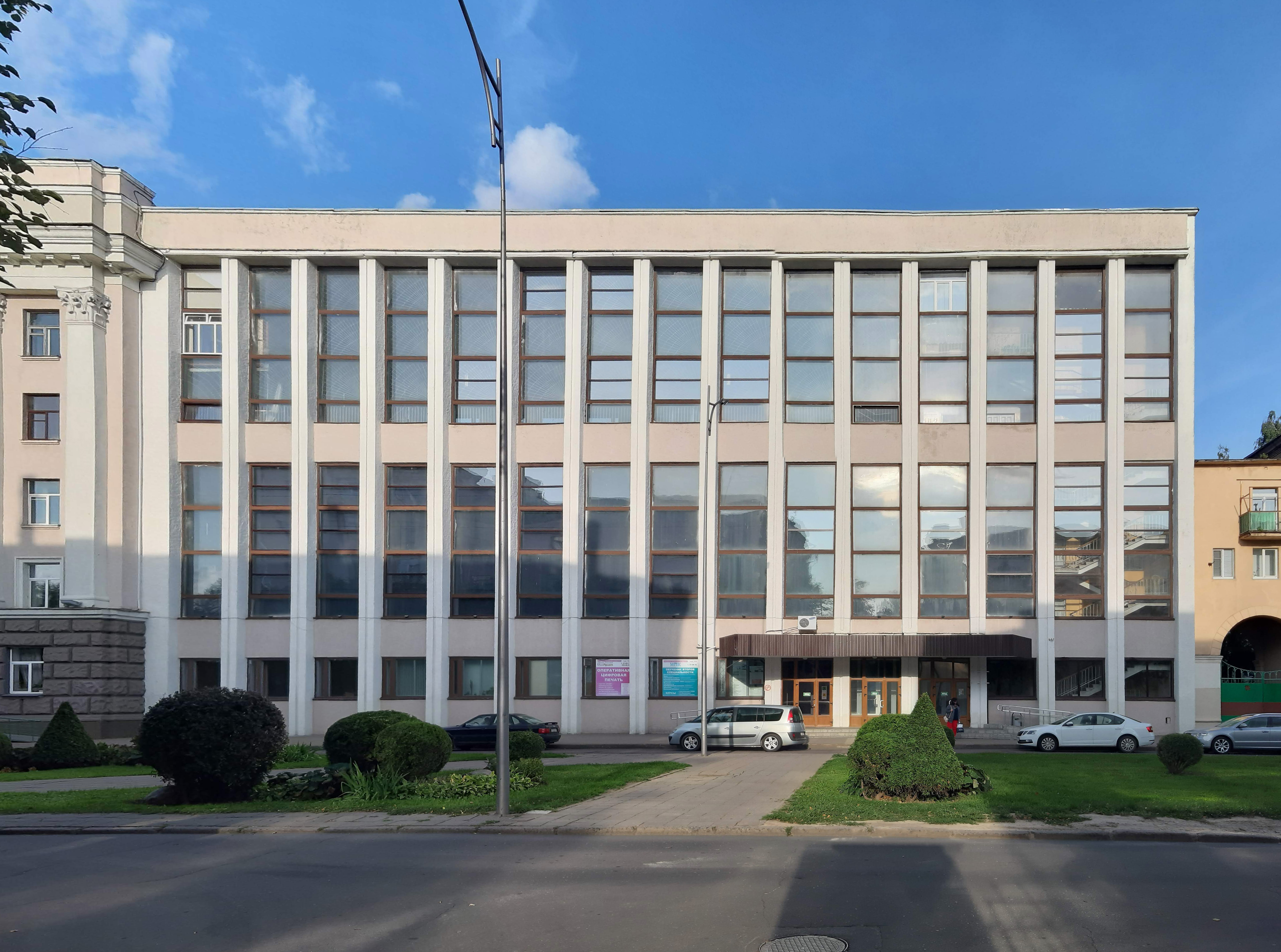 Магілёў. Па бульвары Леніна